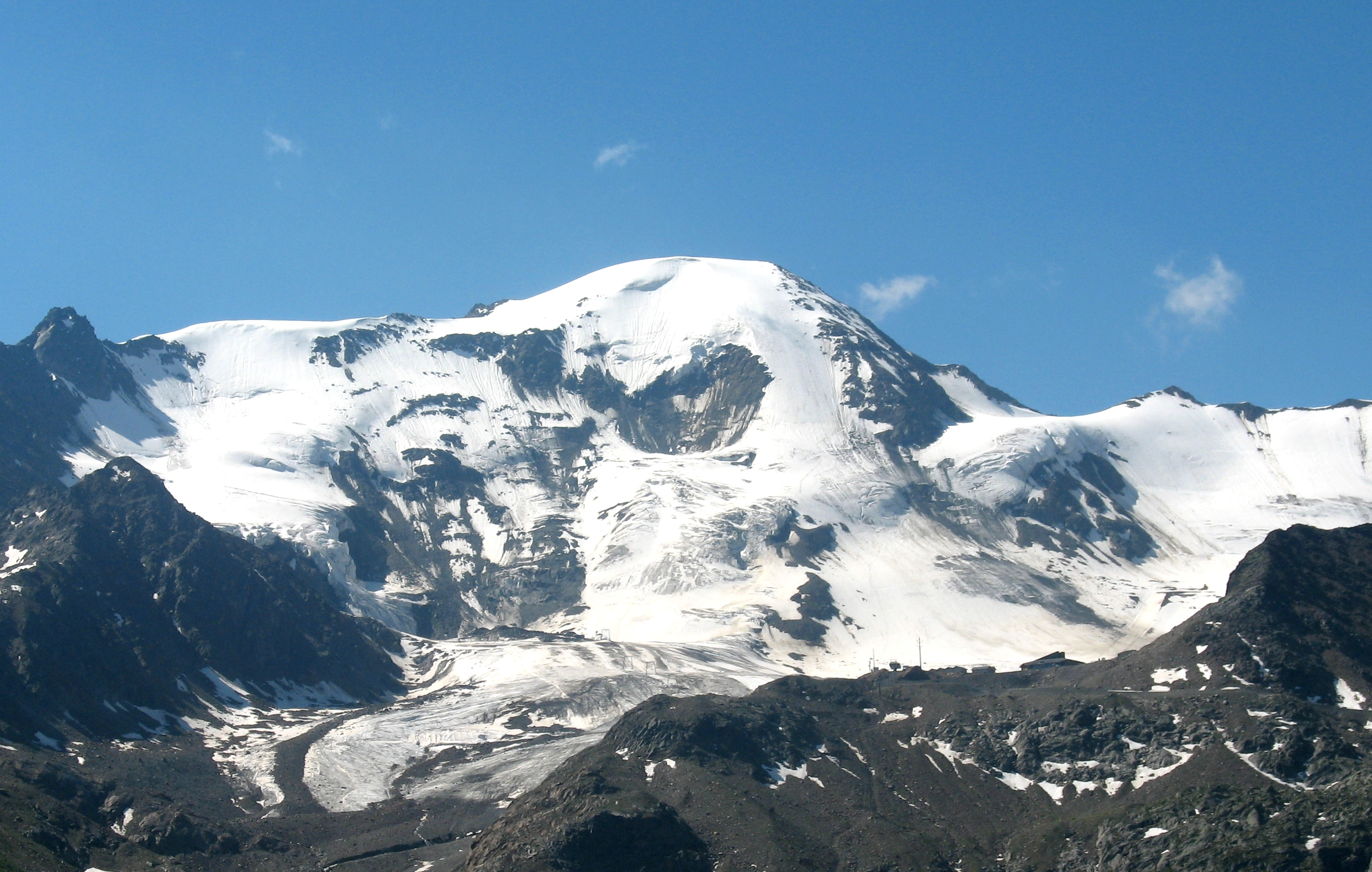 Weißseespitze, Ötztaler Alpen